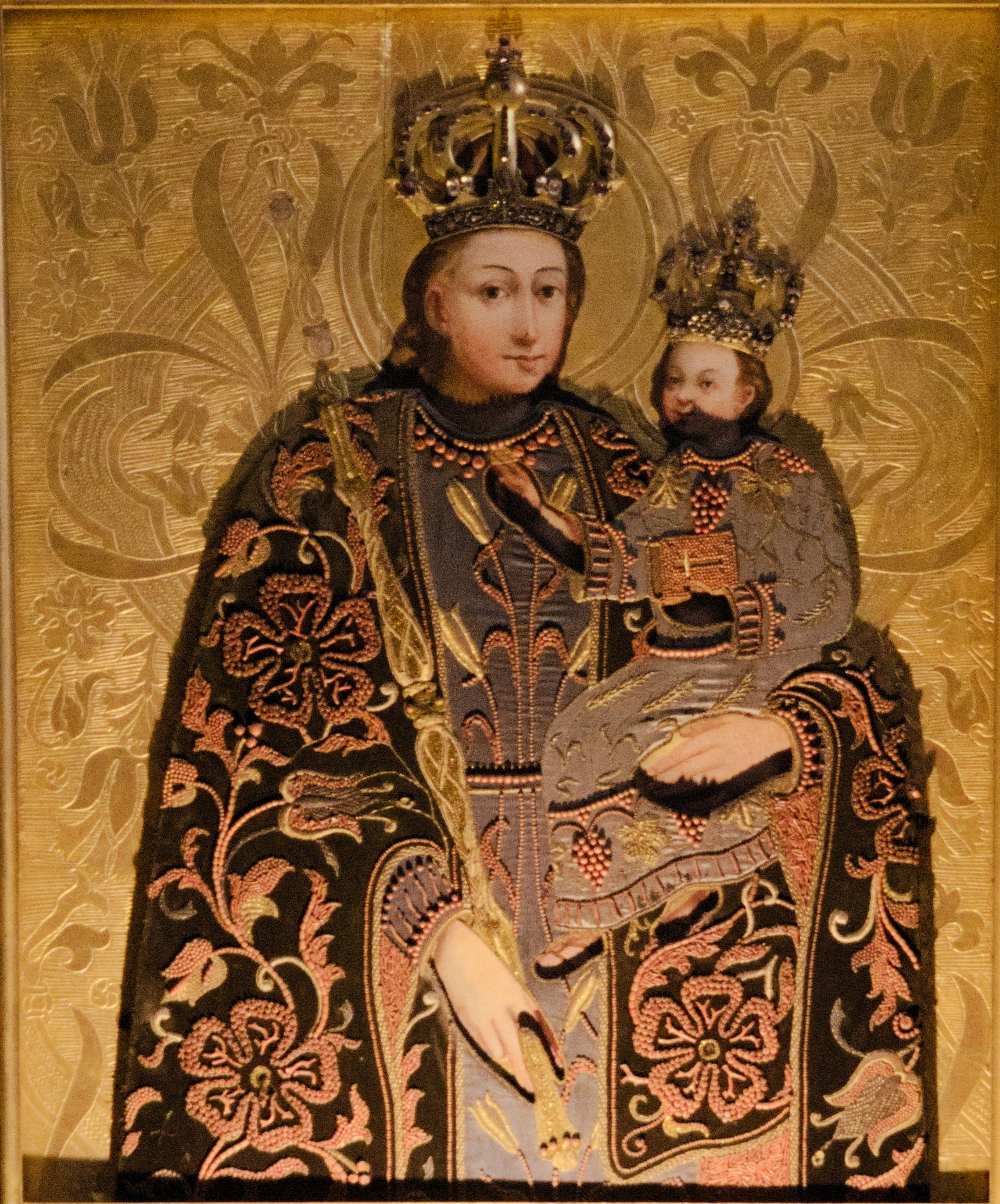 obraz Matki Bożej Dobrej Rady w kościele Świętego Ducha w Lublinie, obraz podświetlony od dołu, zdjęcie wykonane 5 stycznia 2020 roku podczas remontu wnętrza świątyni